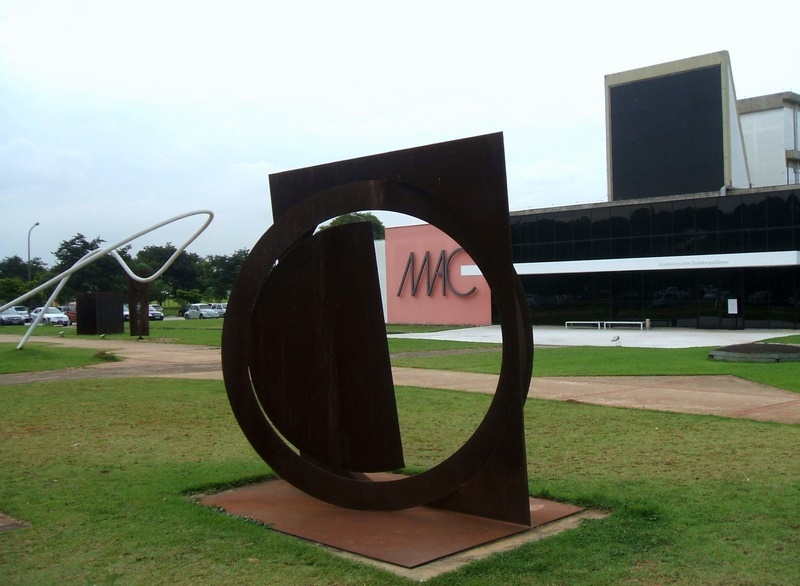 Emanoel Araújo - O quadrado, o círculo e o disco fragmentado, 1994. Aço corten oxidado. Acervo do Museu de Arte Contemporânea da Universidade de São Paulo